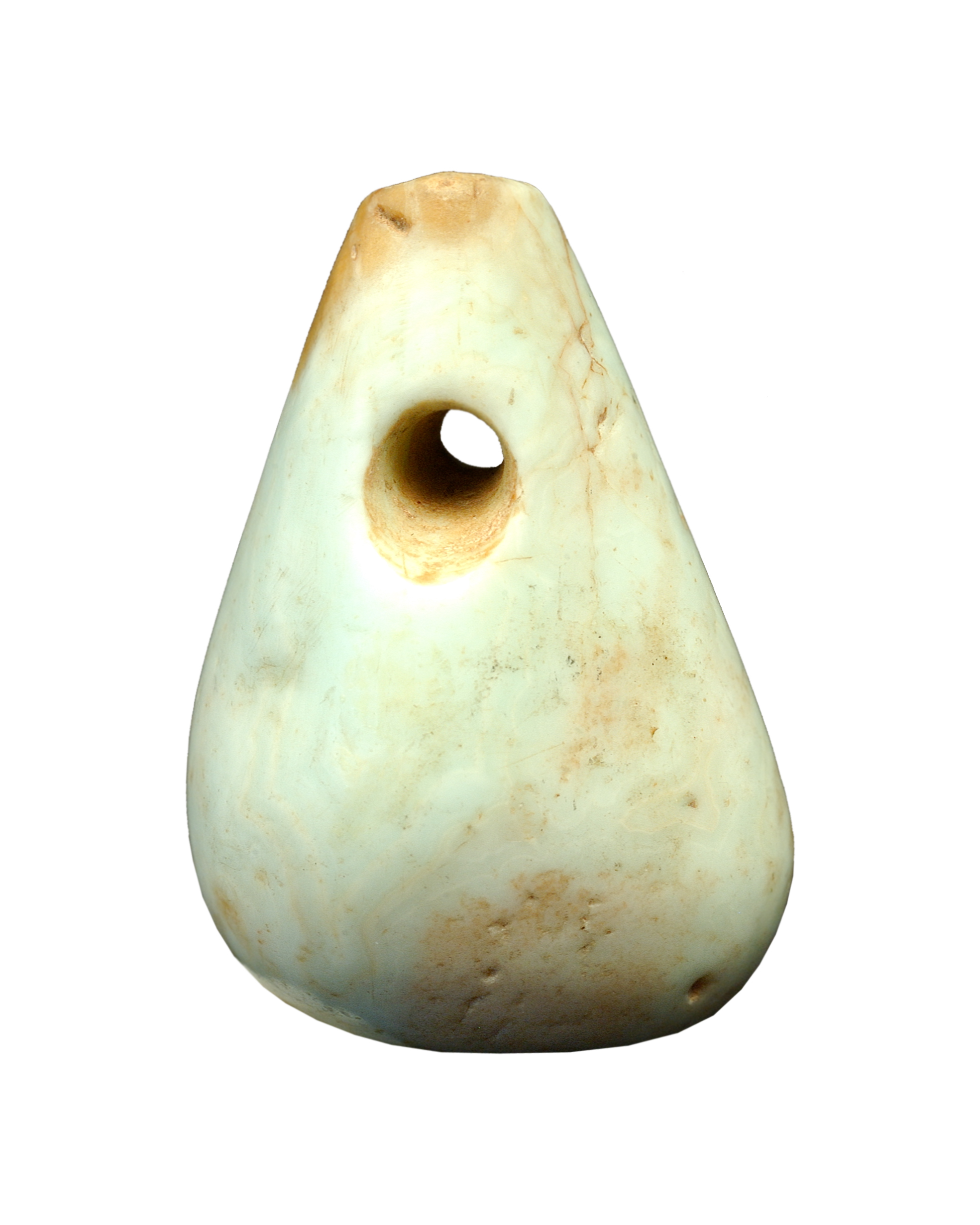 Colgante piriforme de jadeíta (40 mm). Cueva de la Zorrera